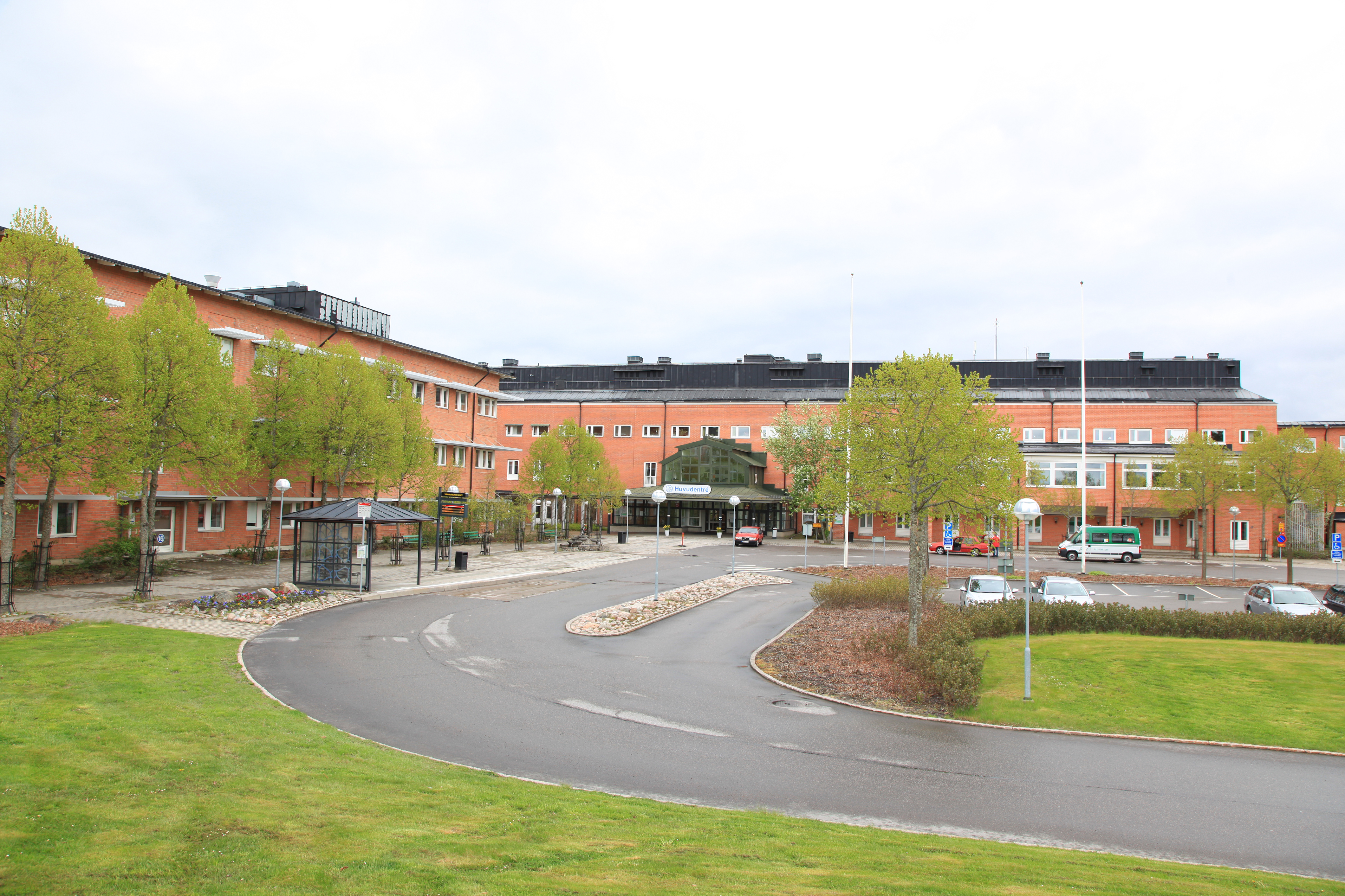 Vrinnevisjukhuset